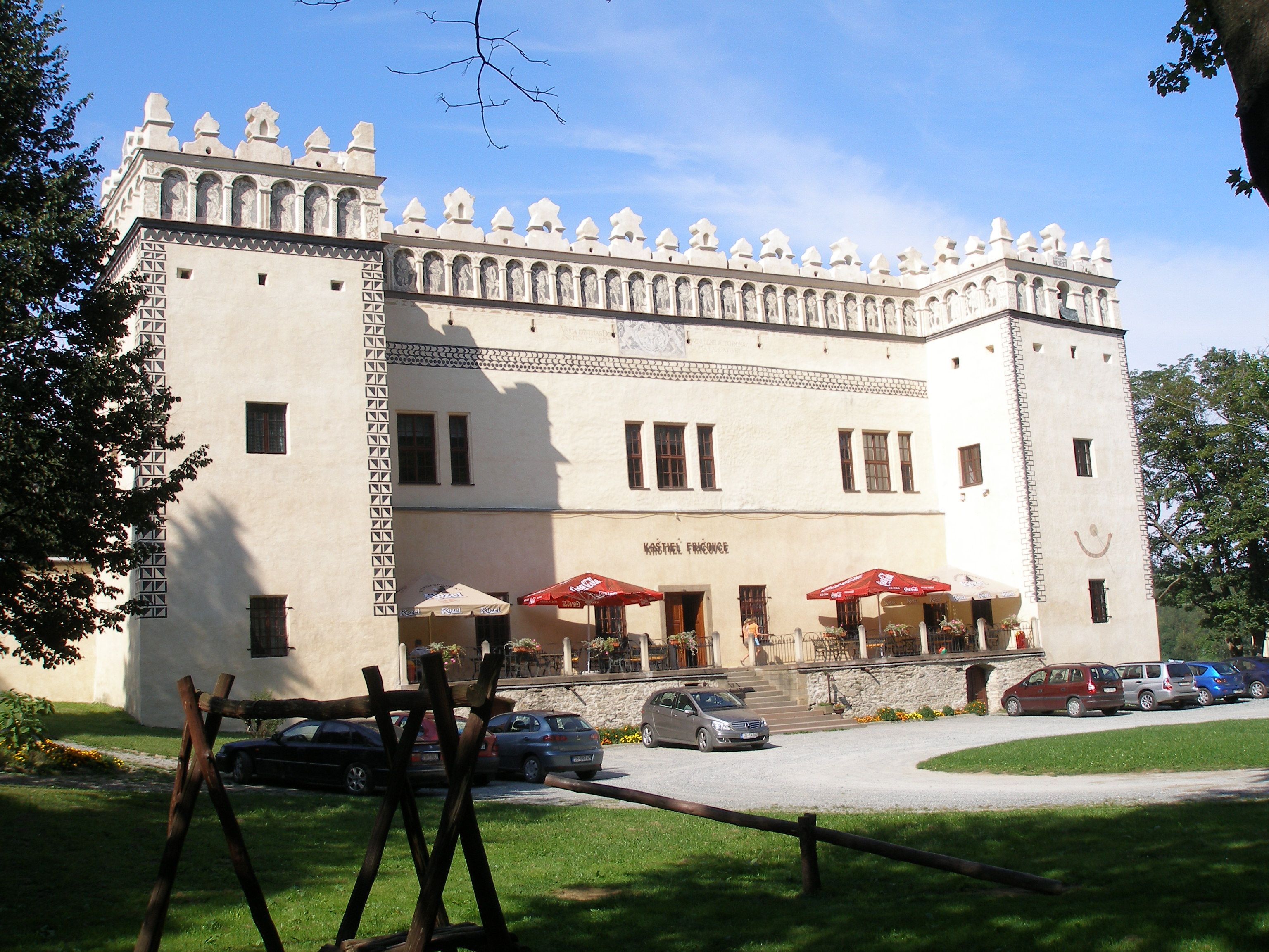 Obec Fričovce okr.Prešov, región Šariš This medium shows the protected monument with the number 707-281/1 in the Slovak Republic.